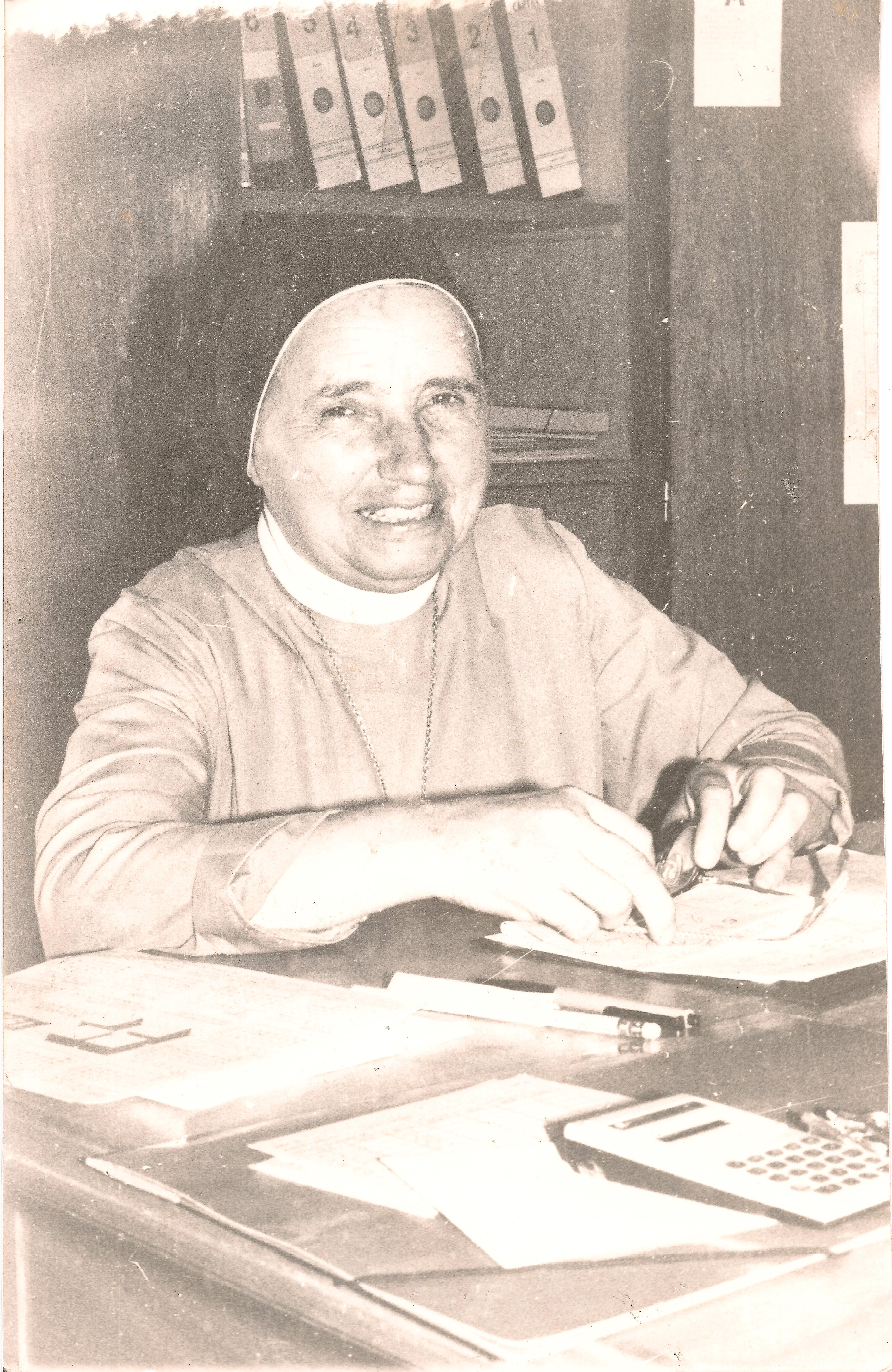 María Alghisi, Madre Superiora del Instituto Canossiano "Nuestra Señora de la Salud" en la ciudad de Jardín América, Provincia de Misiones, Argentina. Fuente: Periodista Horacio Cambeiro.